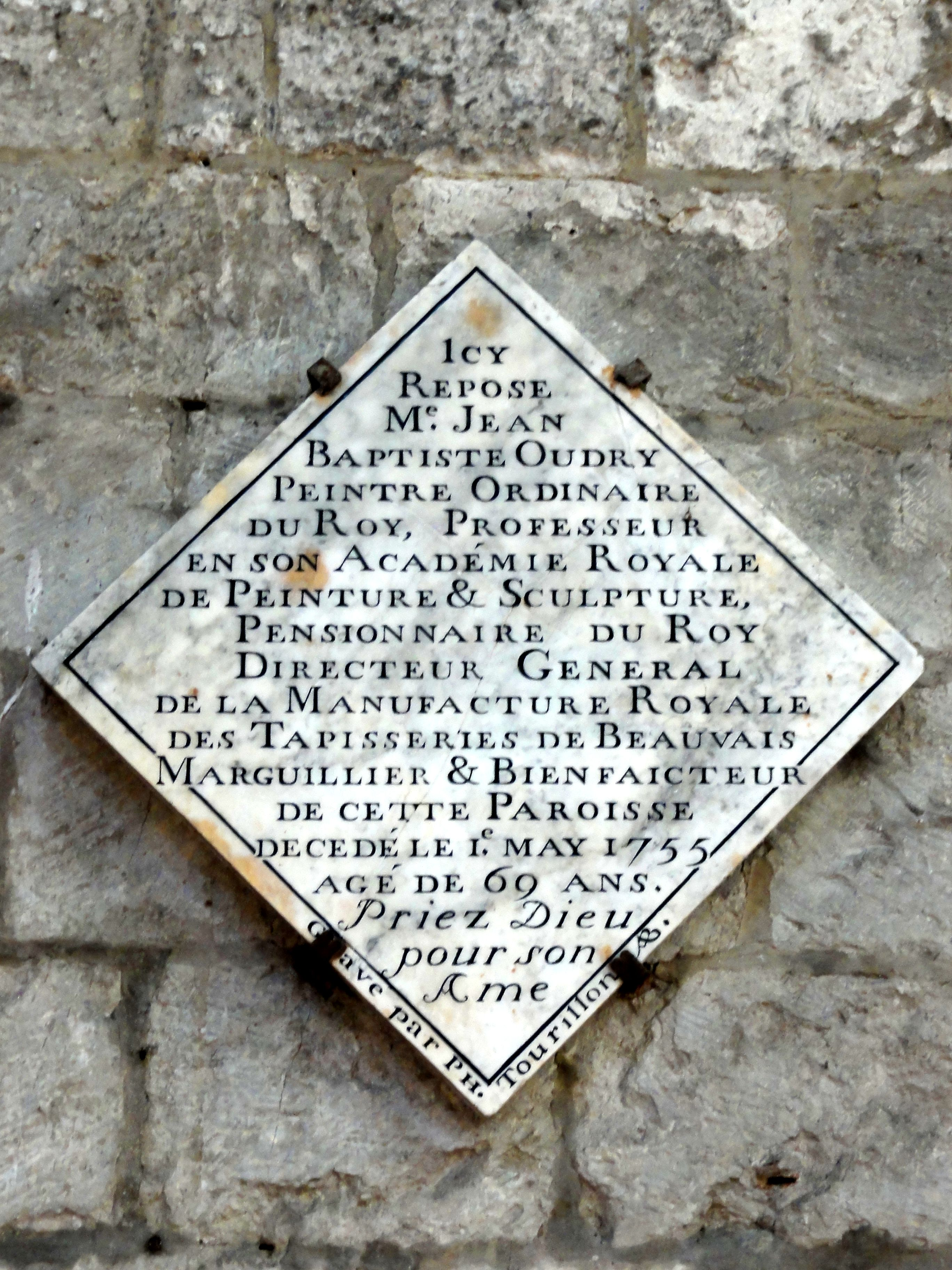 Épitaphe de Jean-Baptiste Oudry.